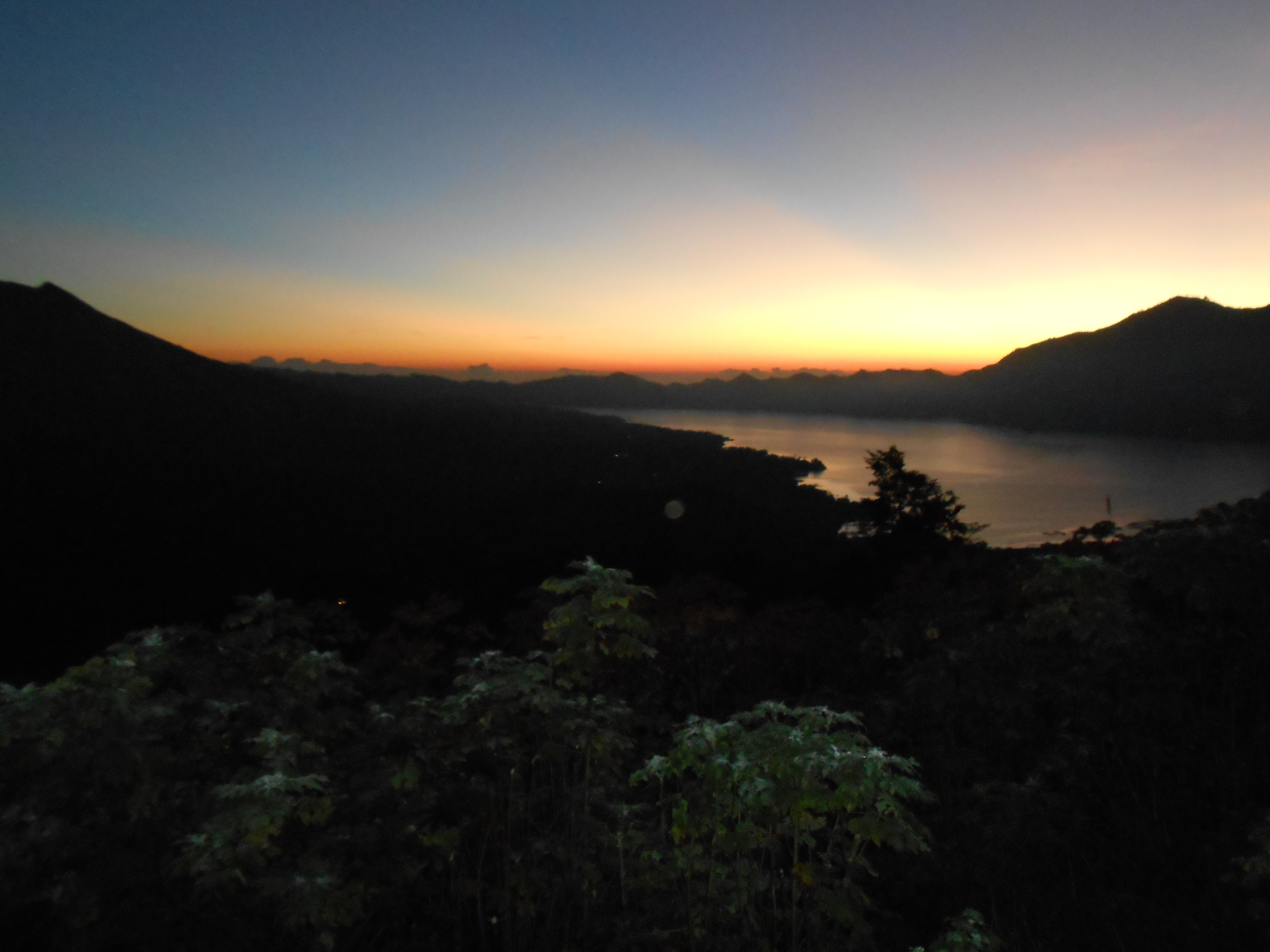 Danau Kintamani